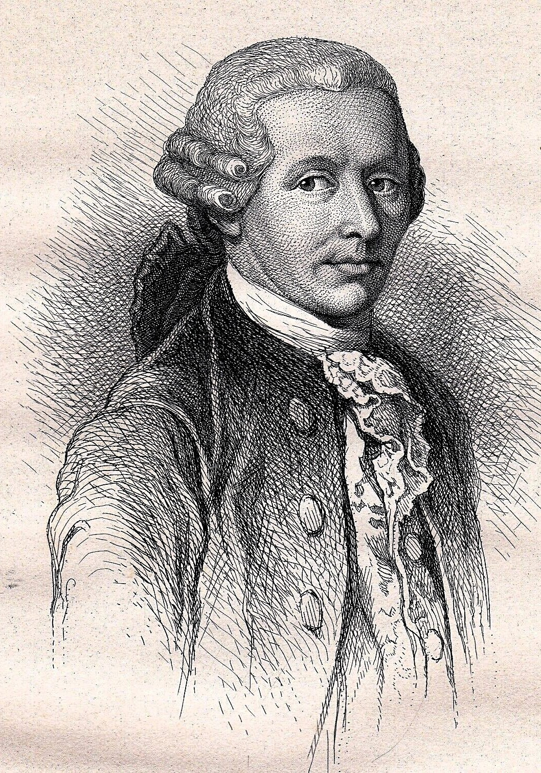 Eau-forte dimensions toute la feuille 26x15 centimètres. Franz Joseph Haydn — il n'utilisait jamais son premier prénom —, né à Rohrau sur la Leitha en Basse-Autriche, le 31 mars 1732 et mort à Vienne le 31 mai 1809, est un compositeur autrichien. Il incarne le classicisme viennois au même titre que Mozart et Beethoven, les trois compositeurs étant regroupés par la postérité sous le vocable de « trinité classique viennoise ». La carrière musicale de Joseph Haydn couvre toute la période classique, allant de la fin du baroque aux débuts du romantisme. Il est à la fois le pont et le moteur qui a permis à cette évolution de s'accomplir. L'image du « papa Haydn » ne vient pas des titres de « père de la symphonie » ou « père du quatuor à cordes » généreusement décernés au xixe siècle et même de nos jours. La création de ces genres relève d'une genèse un peu plus complexe, mais Haydn a très largement contribué à leur émergence et leur consolidation.